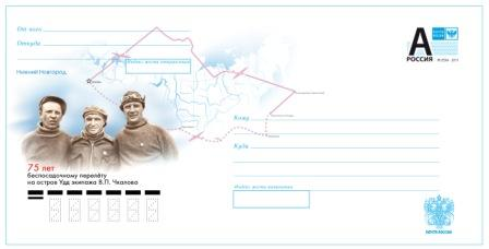 Художественный маркированный конверт «75 лет беспосадочному перелёту на остров Удд экипажа В. П. Чкалова».